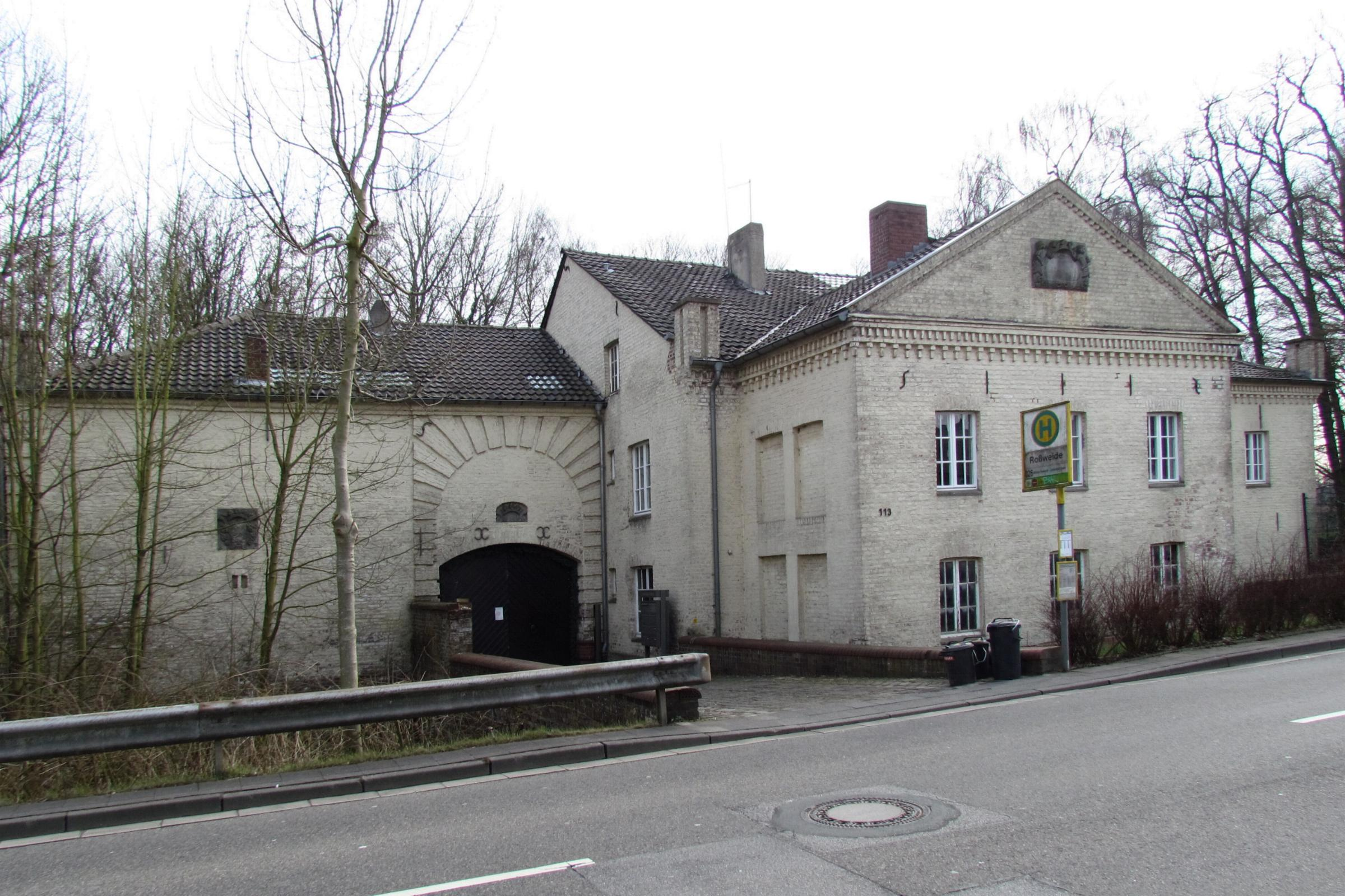 Wassermühle in der Stadt Mönchengladbach